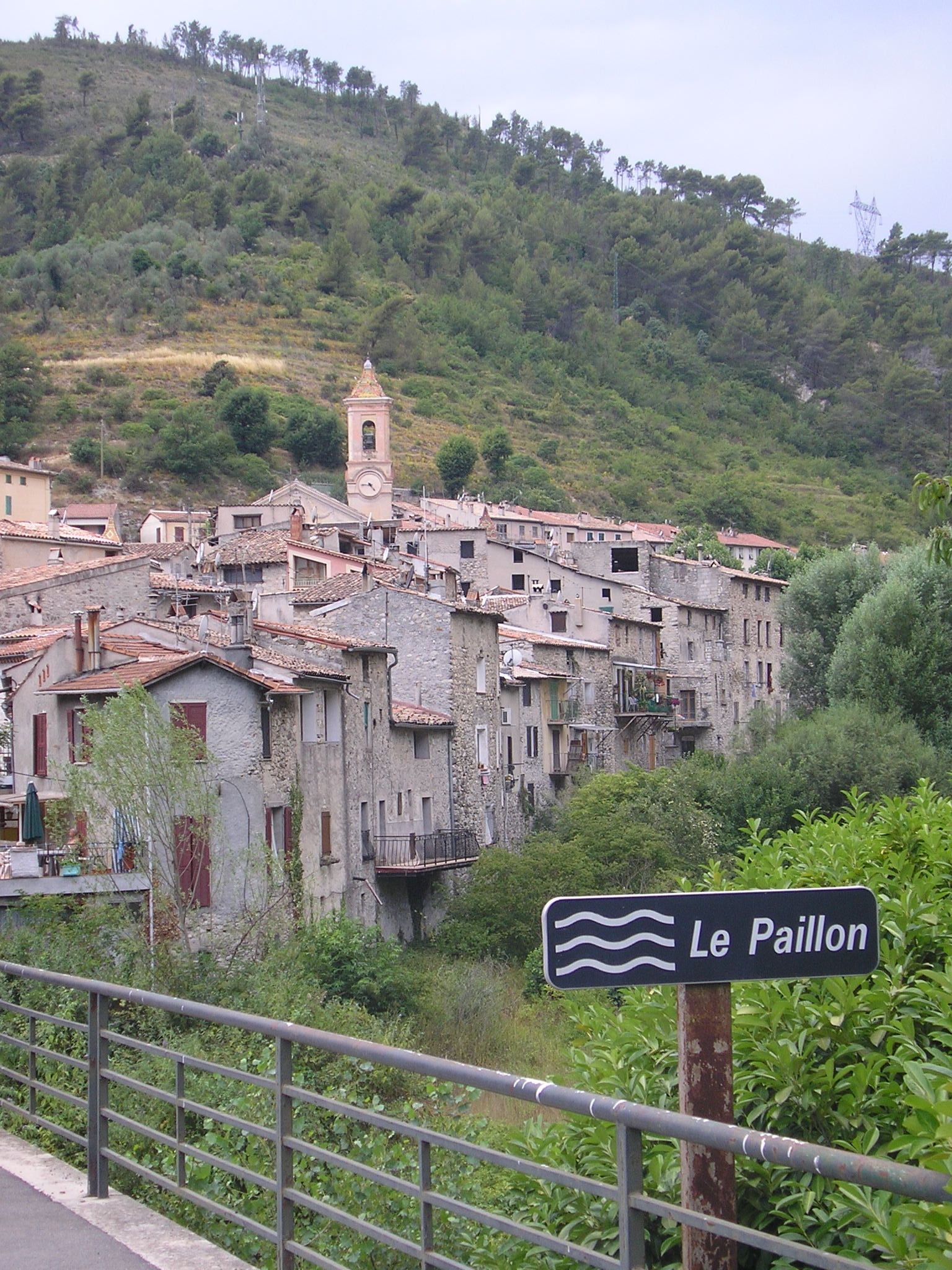 L'Escarène dans les Alpes-Maritimes (06), France